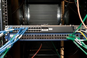 Bi sareko kommutadorea, Juniper (goian) eta Netgear (behean) Fundación Wikimedia-koa Ashburn (Virginia) –an 2012 an.